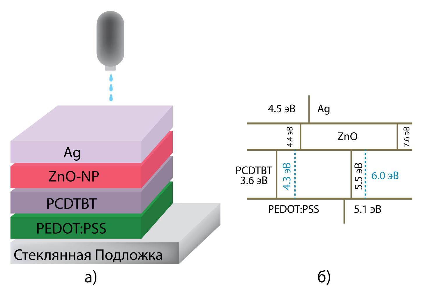 а) структура солнечного элемента, произведенного методом струйной печати; б) схема энергетического уровня его компонентов